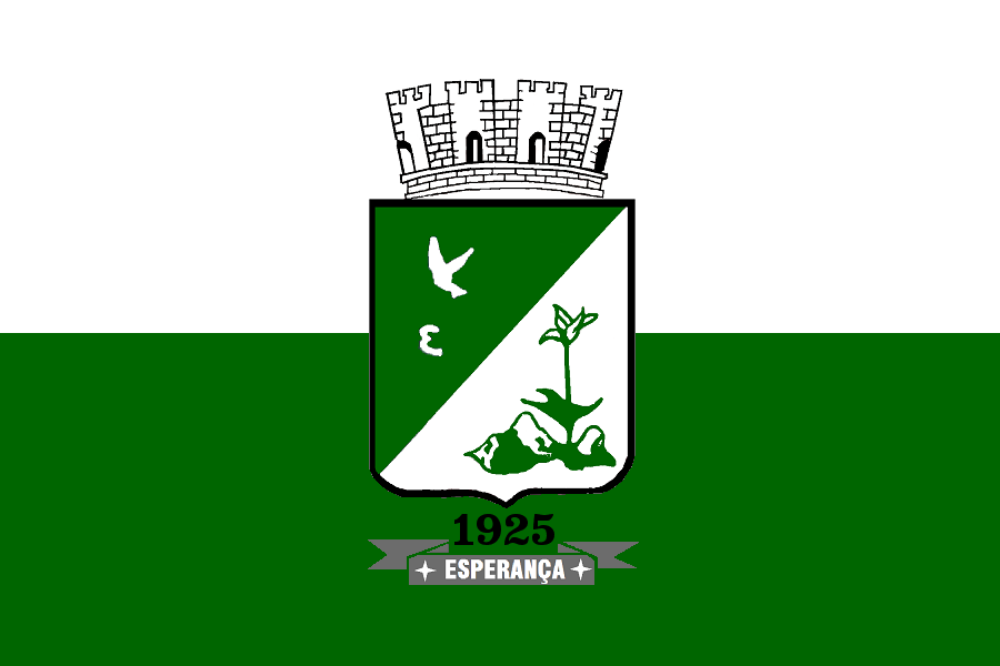 Flag of Esperança municipality, Paraíba, Brazil